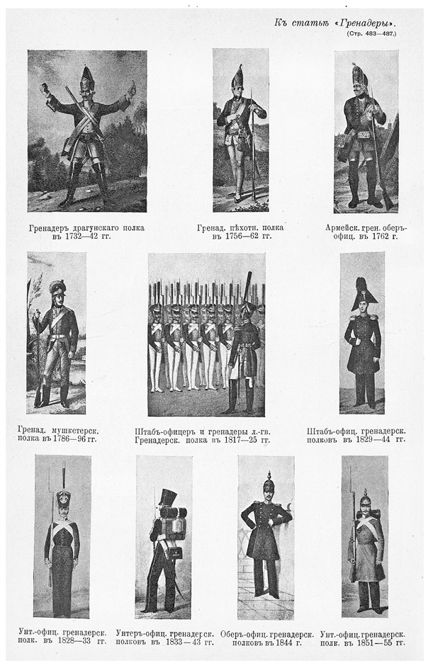 Это изо было использовано в статье «Гренадеры» опубликованной в восьмом томе «Военной энциклопедии», который был издан книгоиздательским товариществом И. Д. Сытина в 1912 году в столице Российской империи городе Санкт-Петербурге.